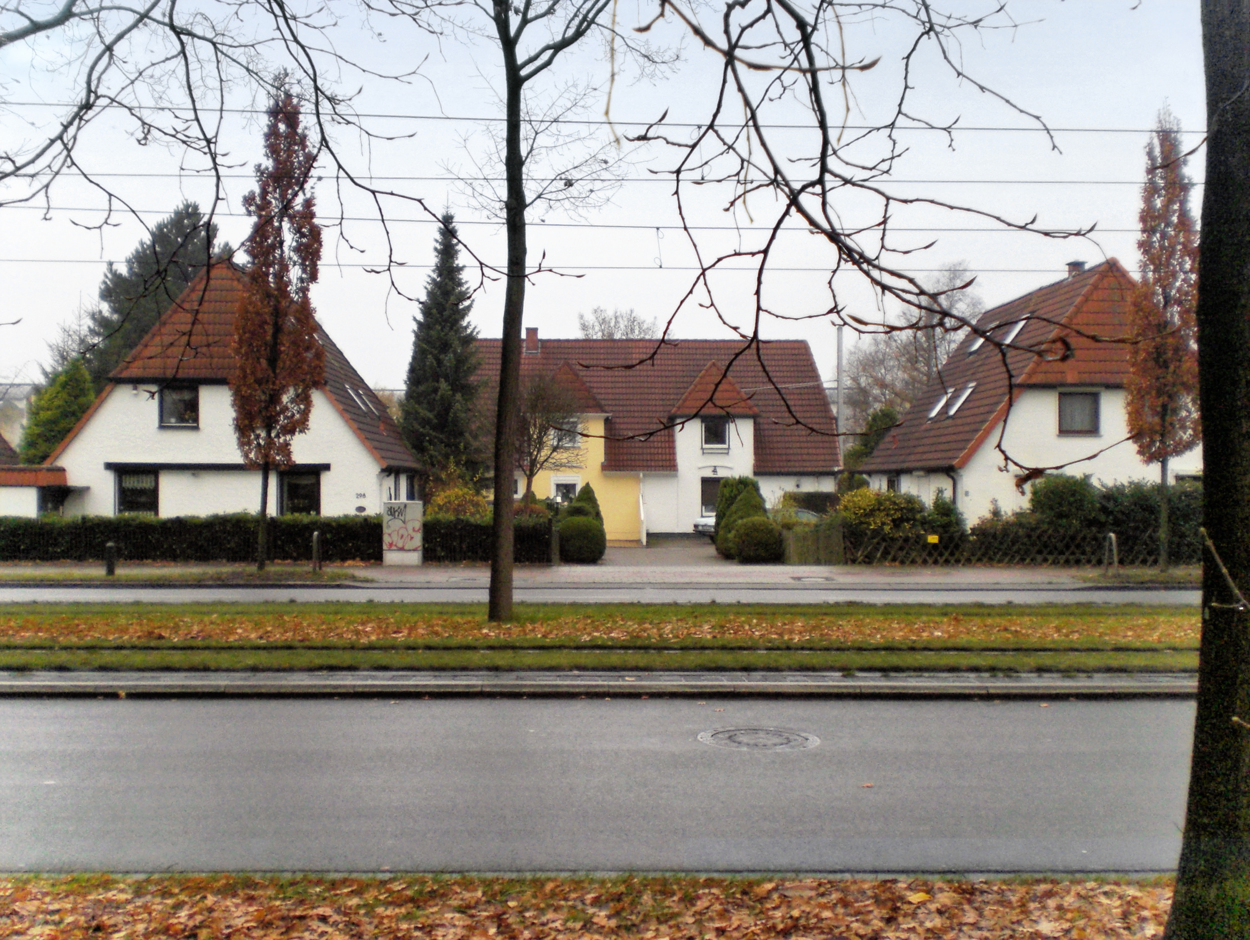 Häuser an der Lilienthaler Heerstraße (auch „Langer Jammer“ genannt) in Bremen